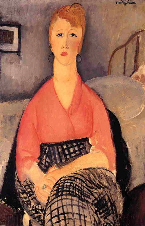 La blouse roselabel QS:Lfr,"La blouse rose" or